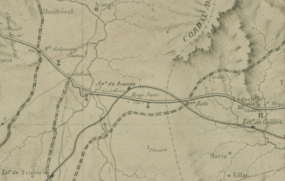 Apeadoiro de Aranga na Carta geométrica de Galicia con el trazado de ferro-carriles y carreteras kilometradas, año de 1917.